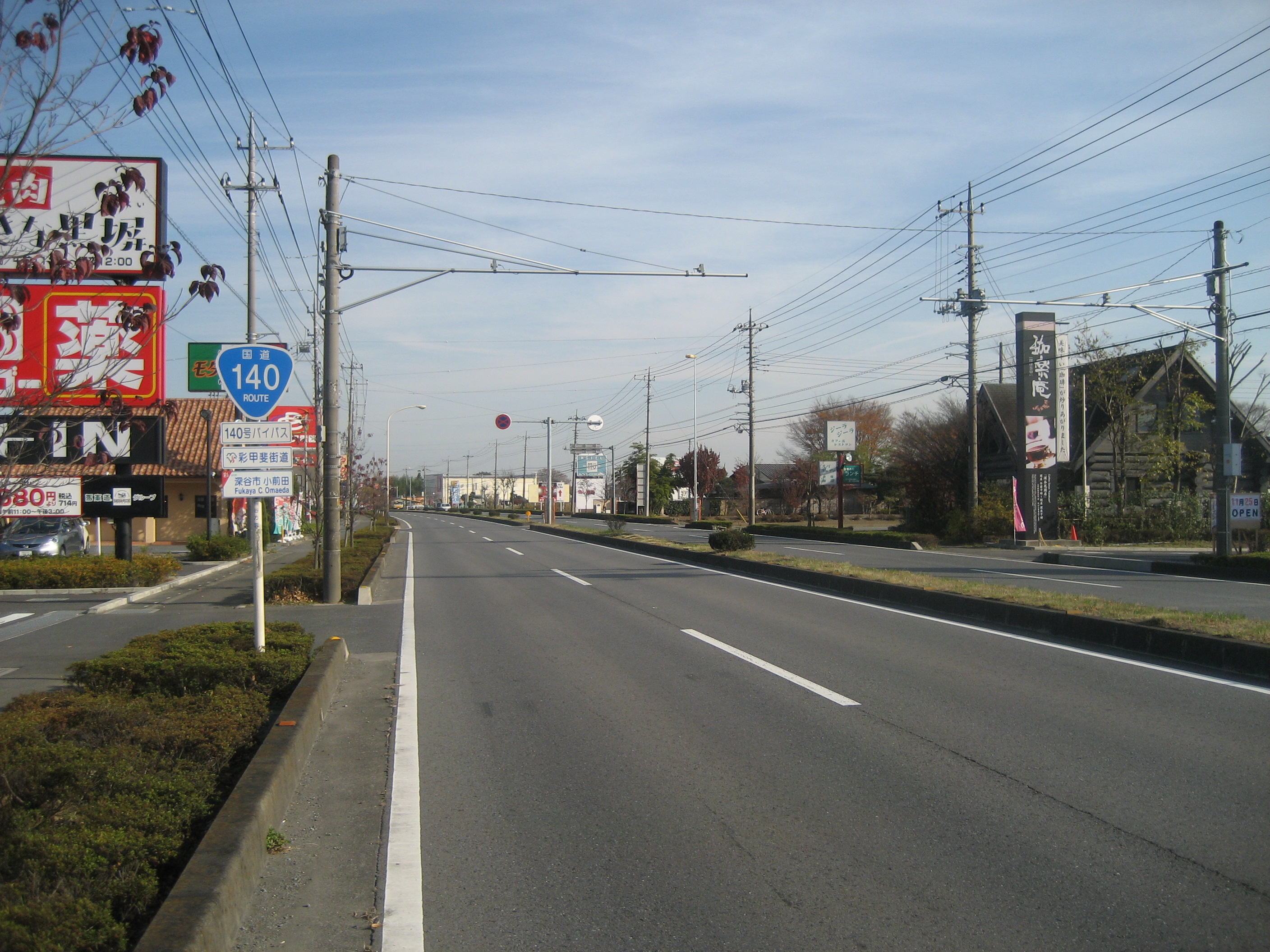 国道140号線バイパス深谷市小前田（熊谷方面を撮影）